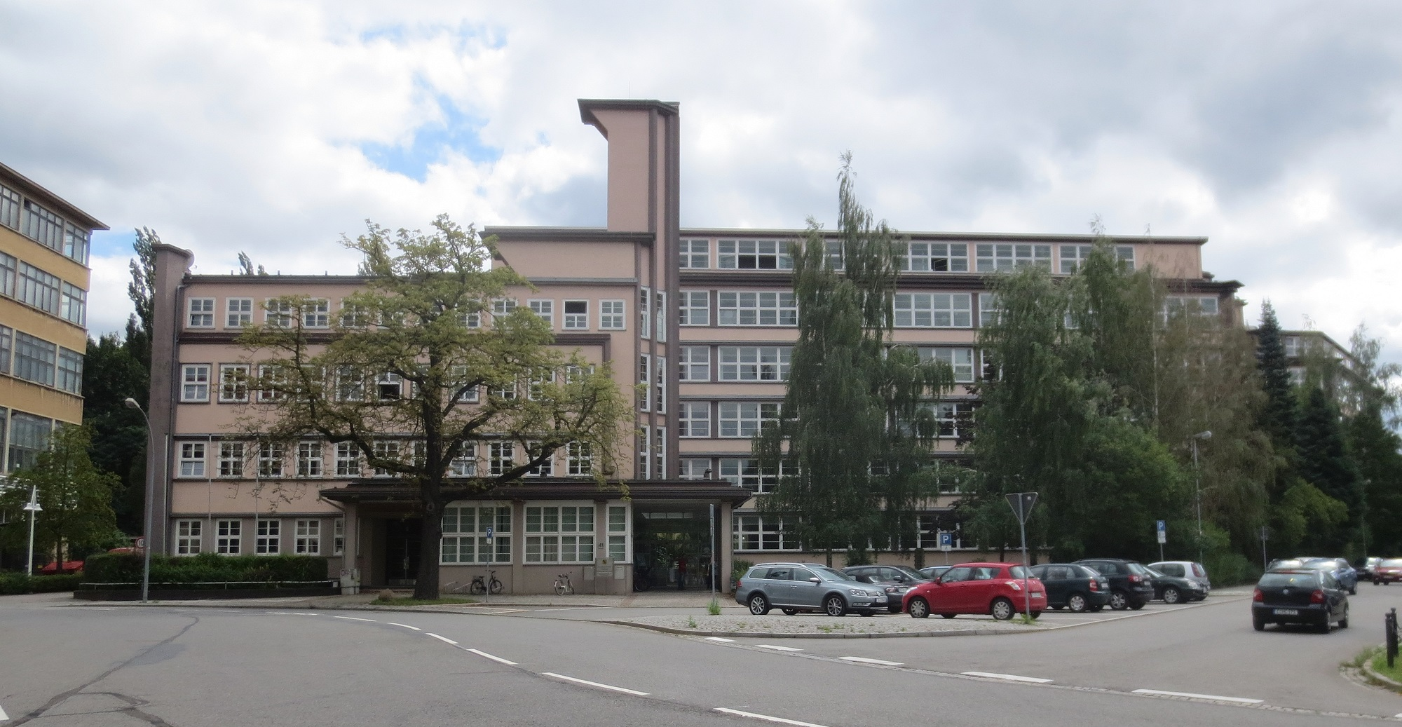 Verwaltungsgebäude. Kulturdenkmal Chemnitz Altchemnitz.